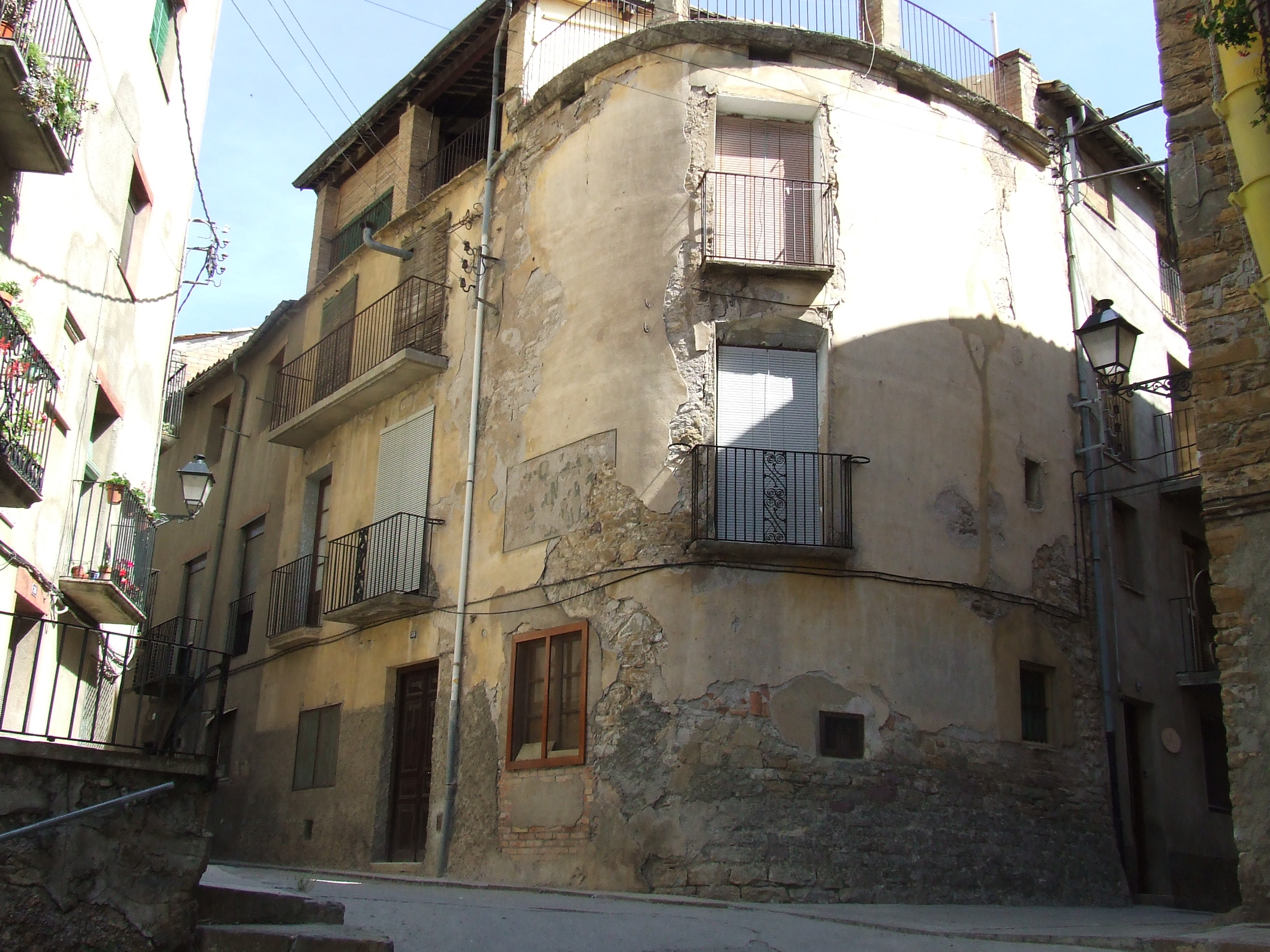 Casa del Raval de la Pobla de Segur (Pallars Jussà)